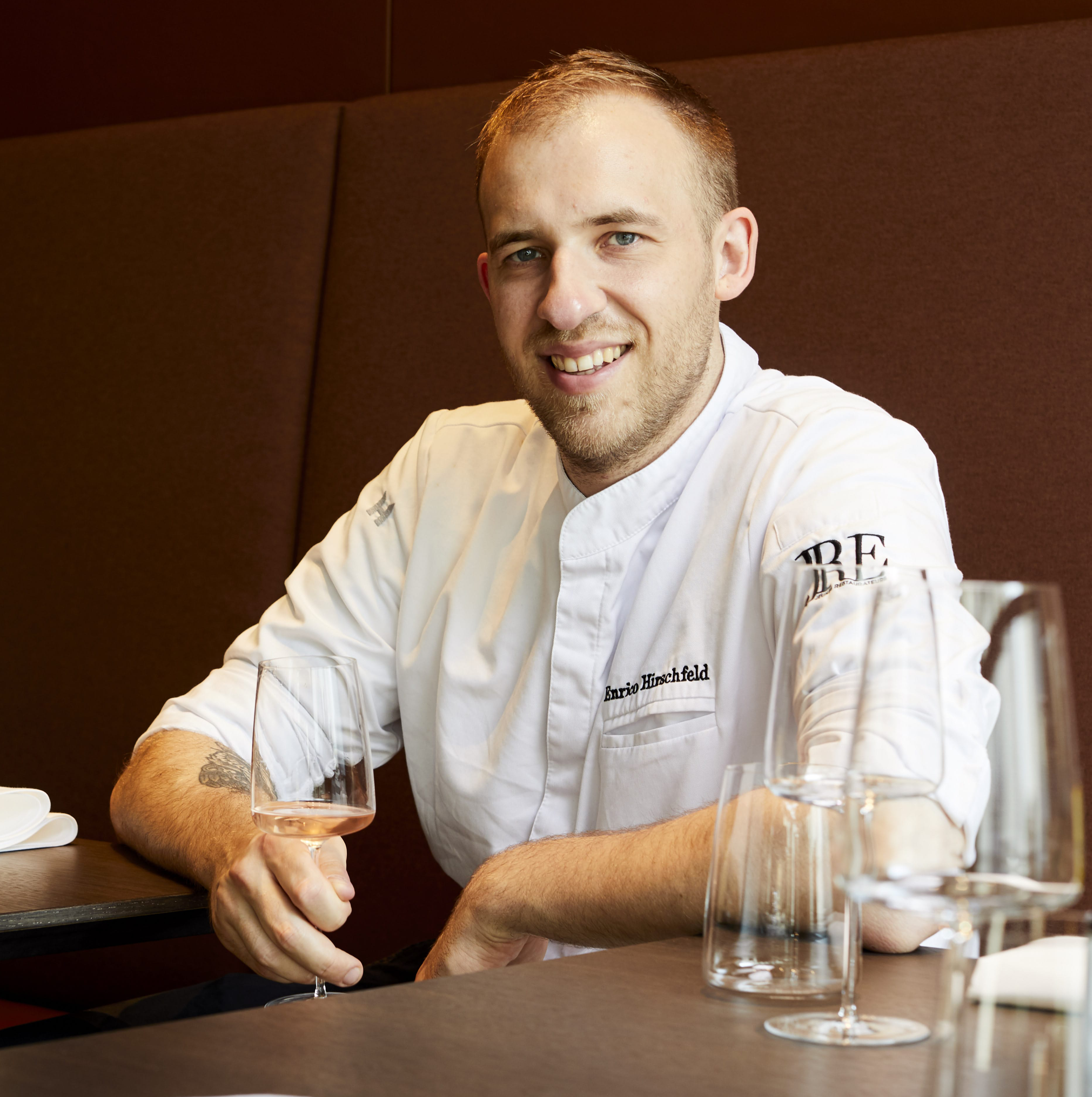 Enrico Hirschfeld im "Heinzhermann"